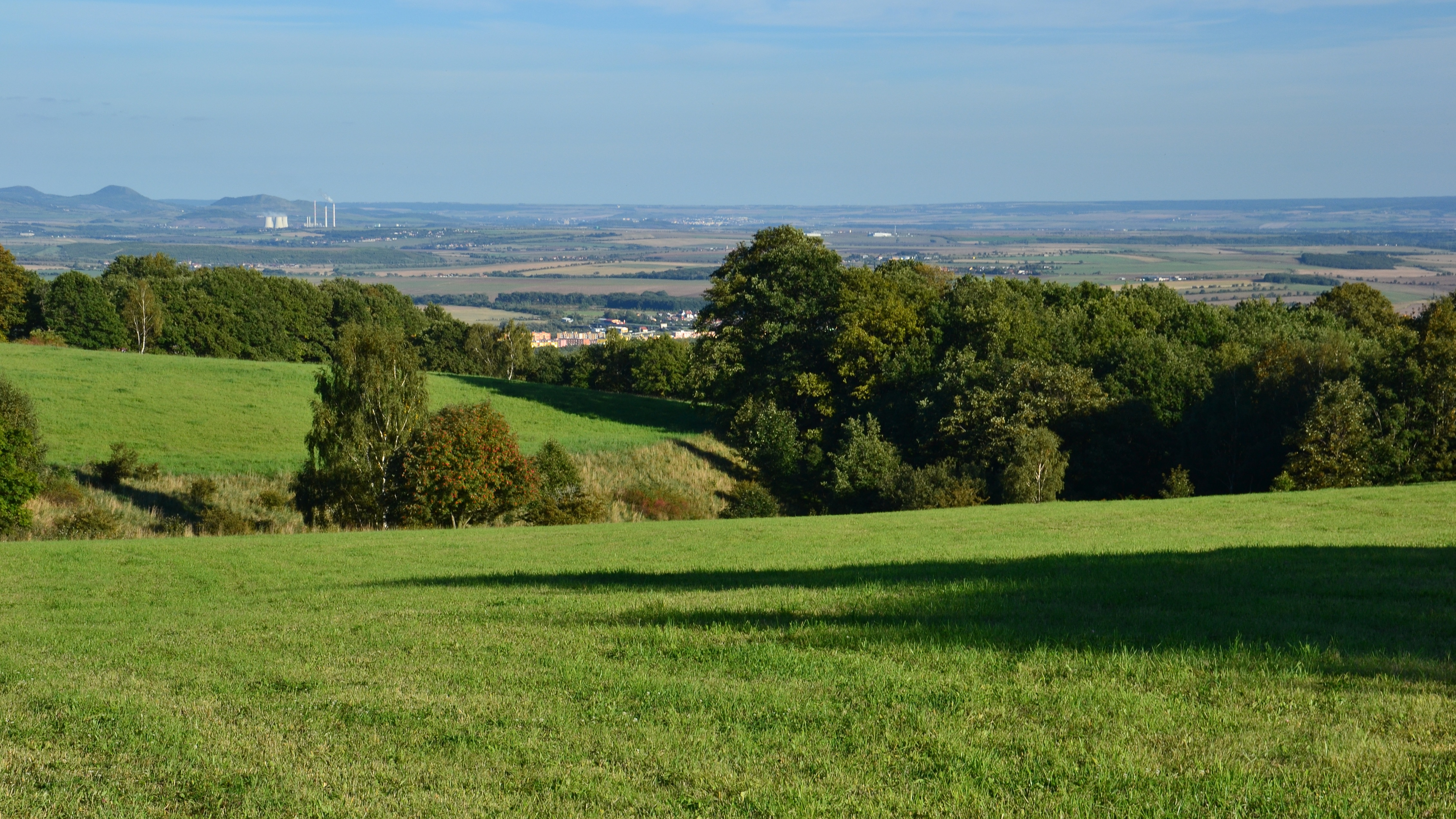 Krajina východně od Šerchova